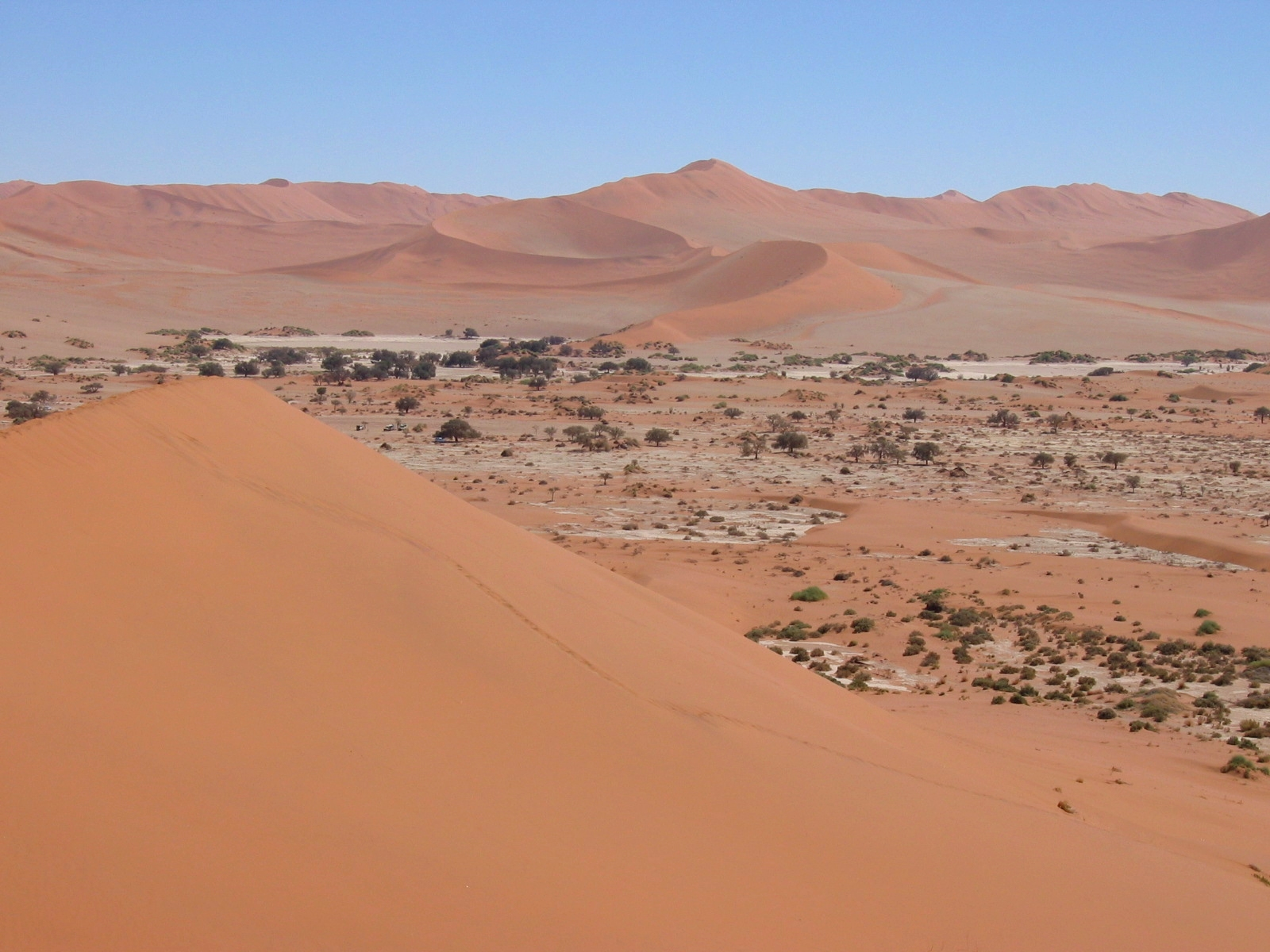 Sossusvlei, Namibia